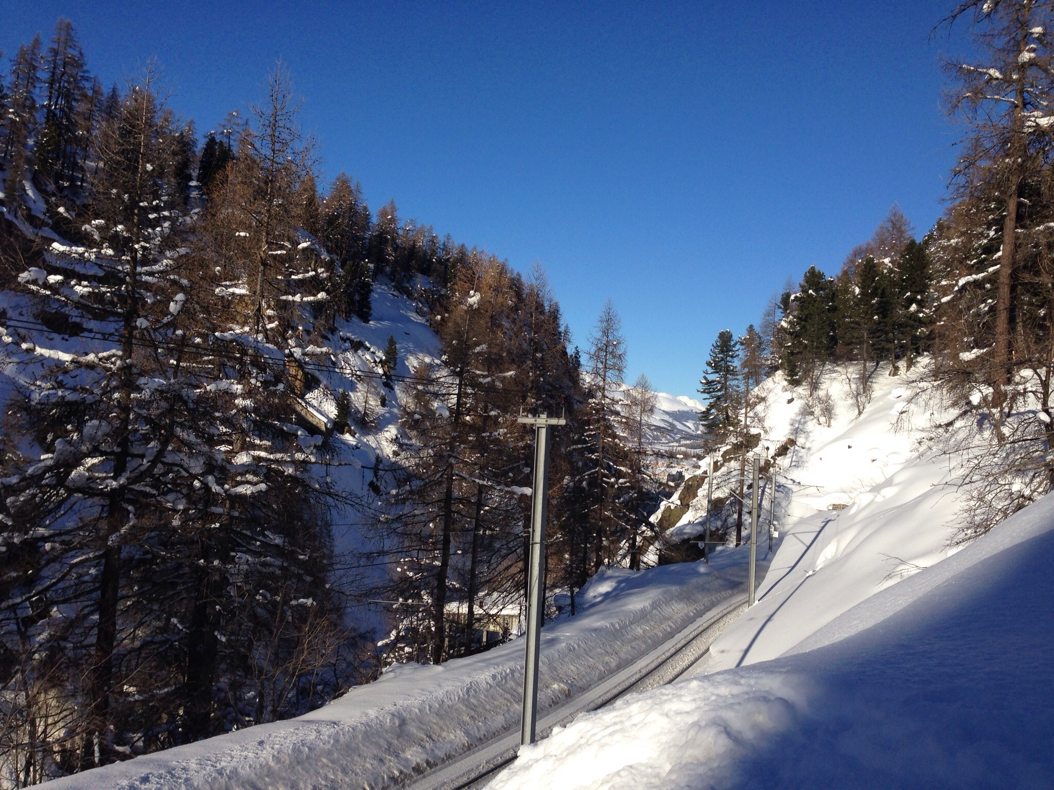 Eingang zur Charnadüraschlucht bei St.Moritz